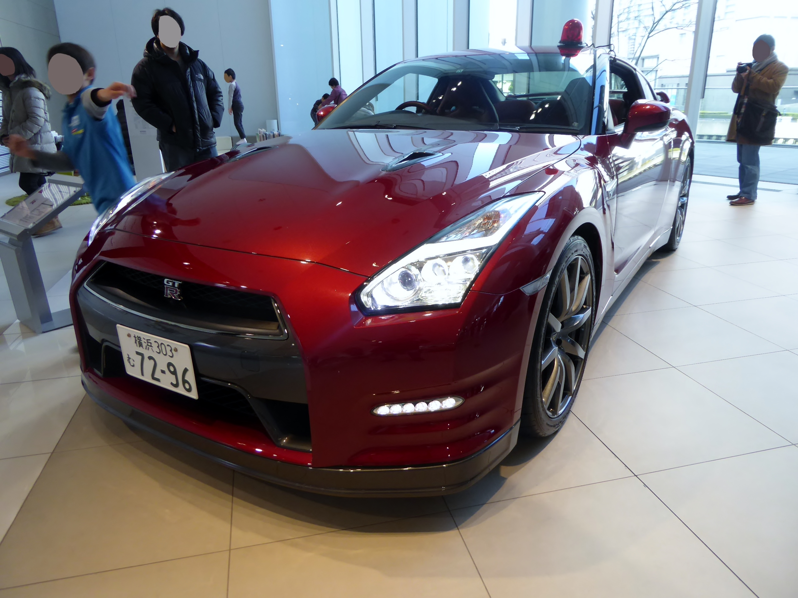 『さらば あぶない刑事』仕様の2014年型日産・GT-Rプレミアムエディションを撮影。